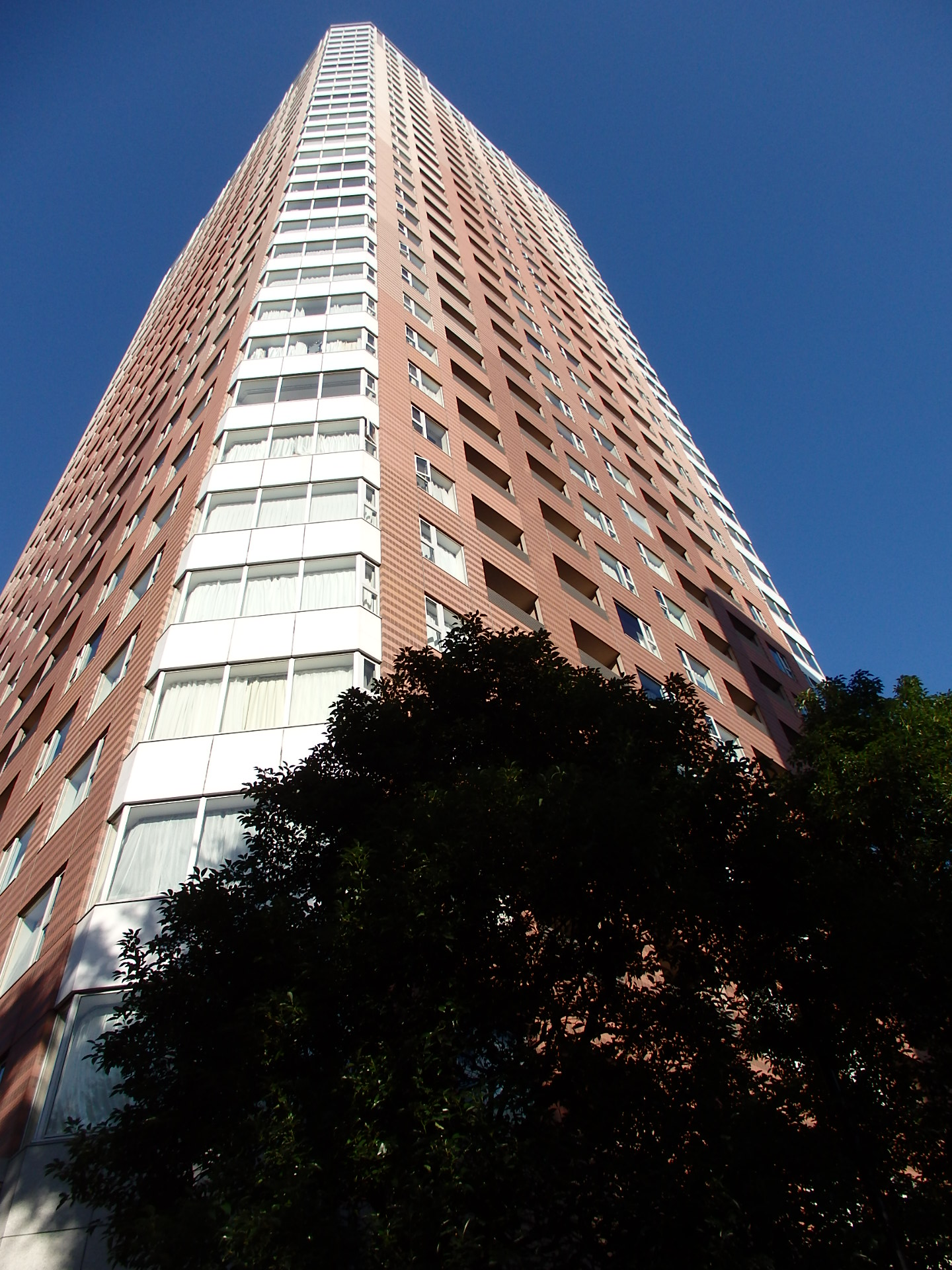 ウエストパークタワー池袋